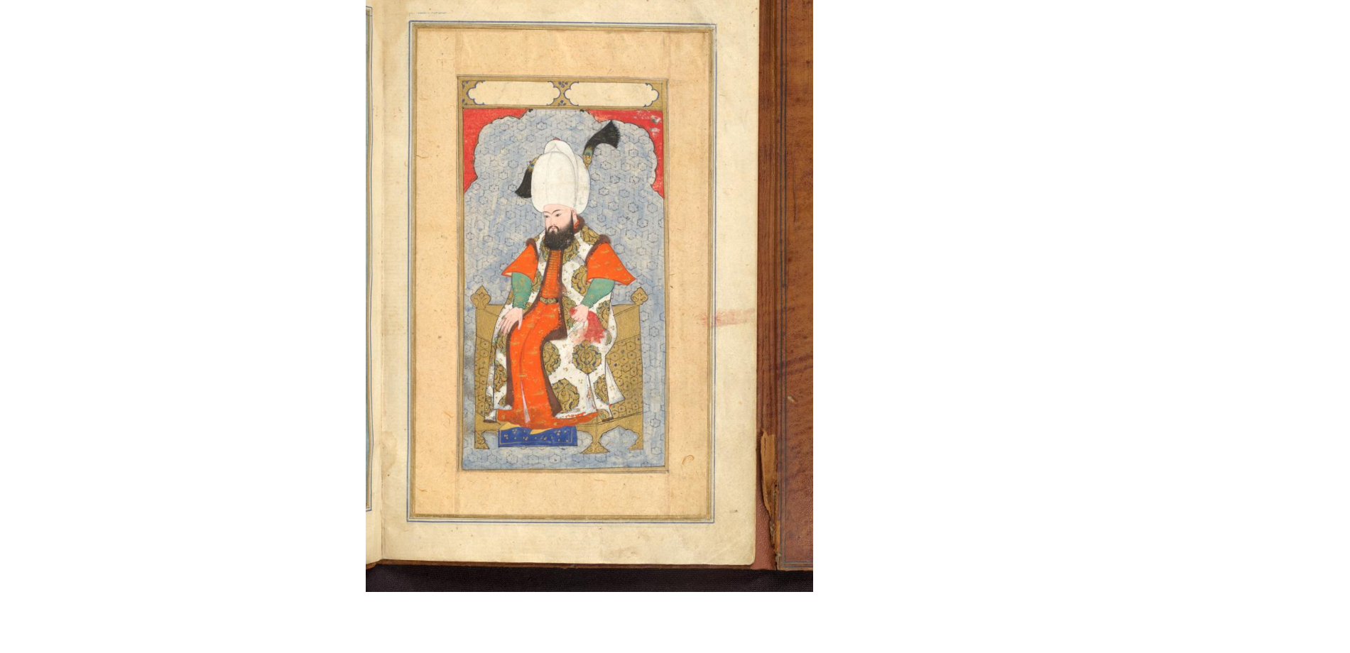 Genealogie und kurze Geschichte aller Propheten und Herrscher von Adam bis Sultan Muhammed III. Handschrift auf Papier Kerbela, ca.1595